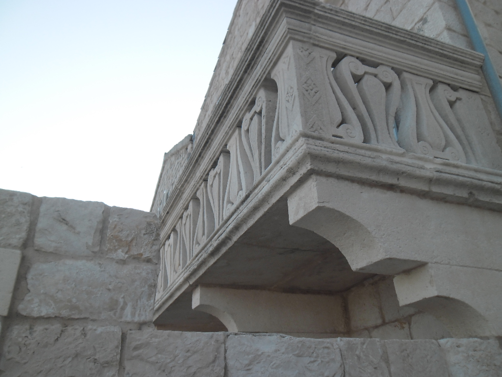 grad Vis